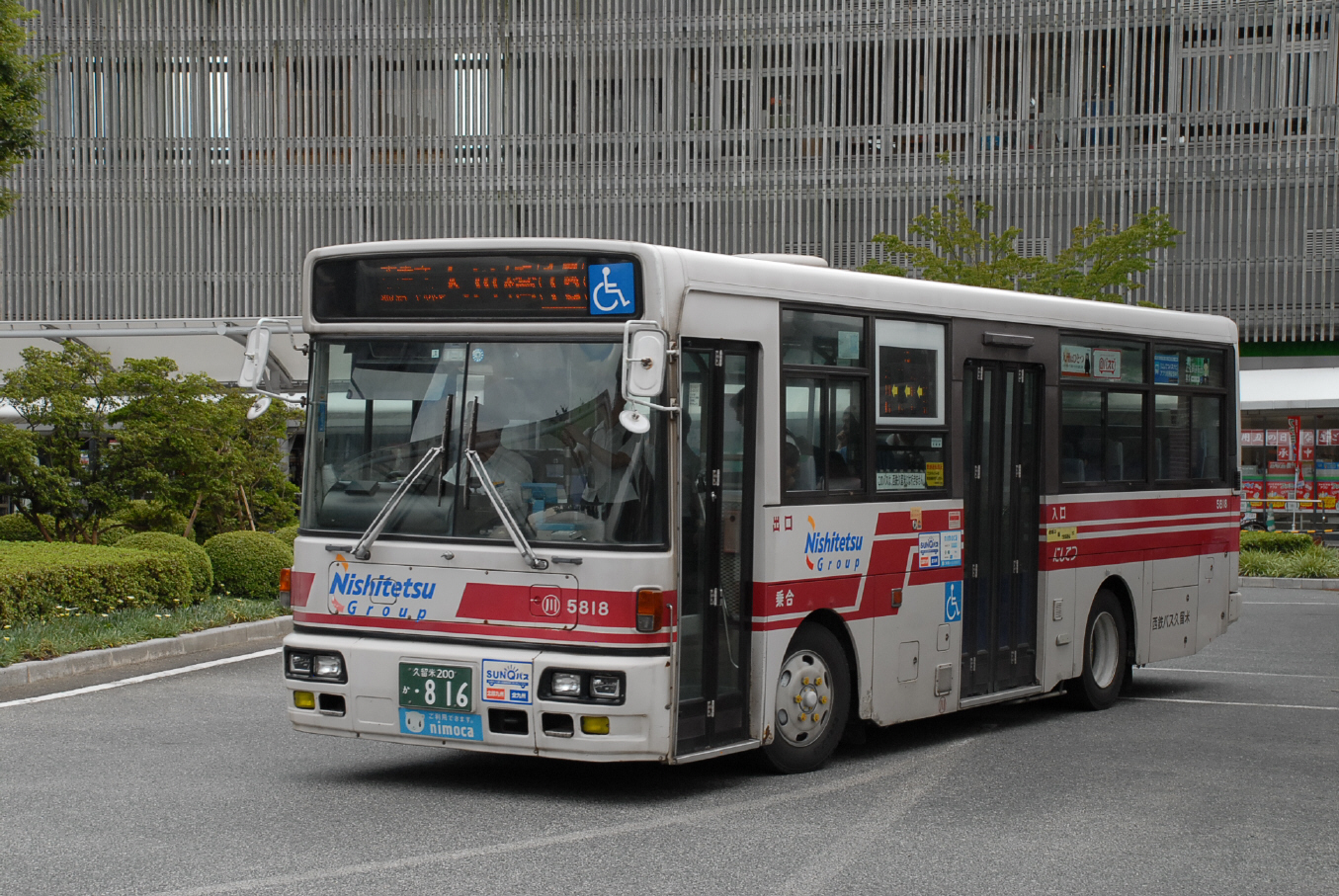 JR久留米駅にて撮影